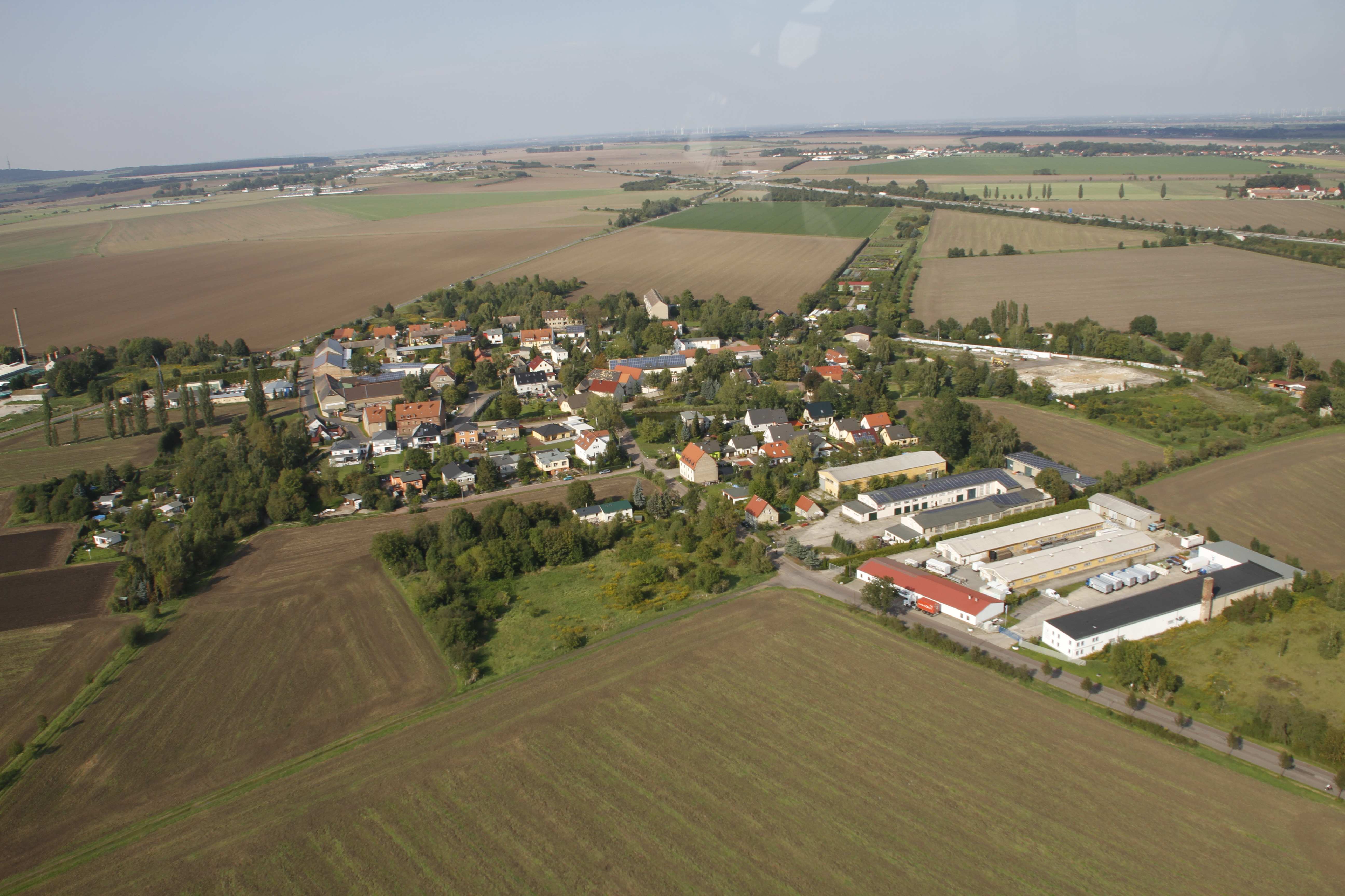 Luftbild von Halle-Tornau von Süd-Osten. Entstanden bei einem Hubschrauberflug am Tag der offenen Tür des Flugplatzes Oppin